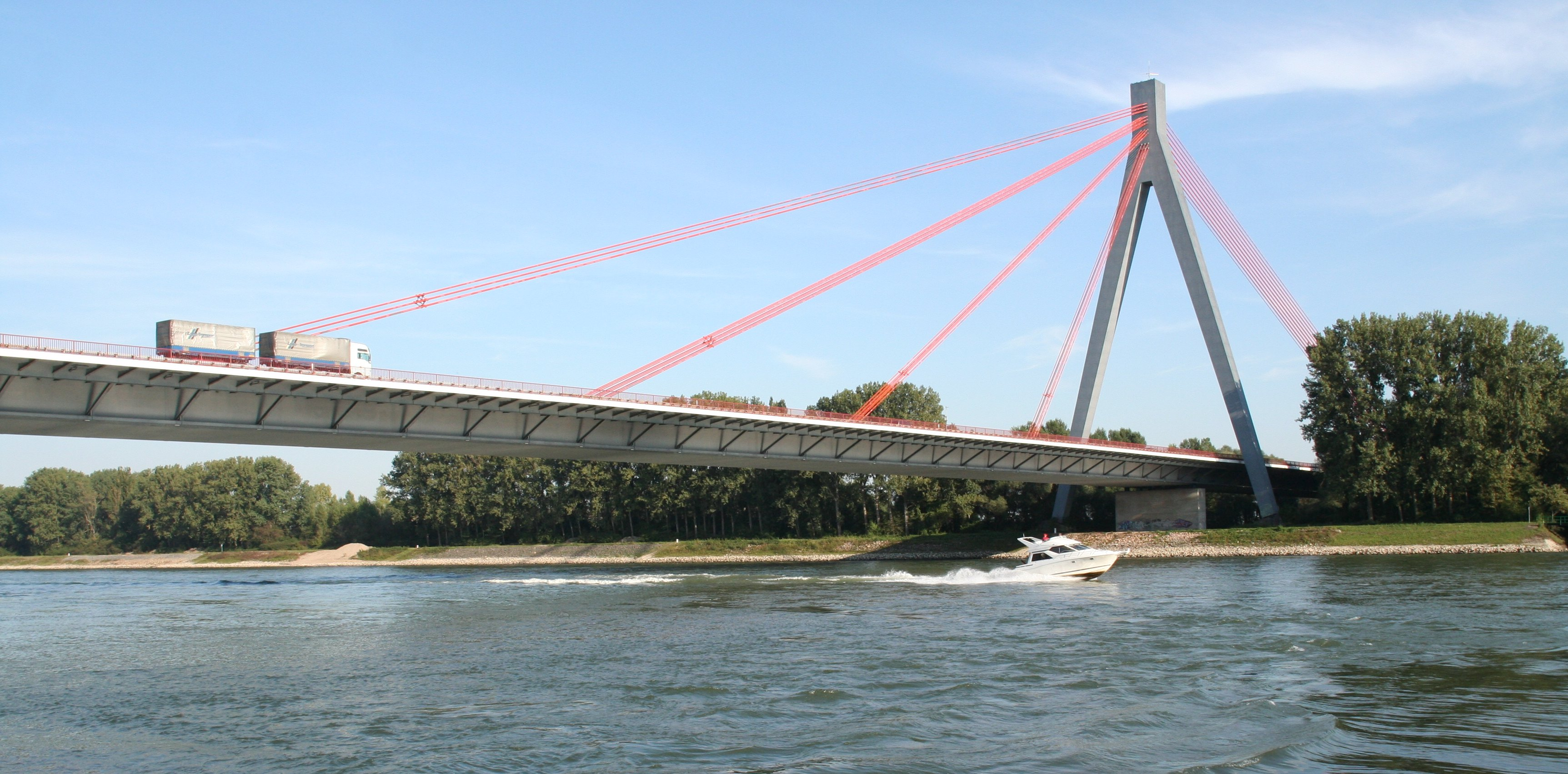 Rheinbrücke Speyer A61